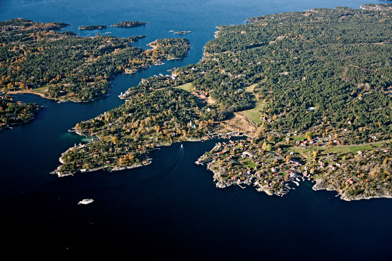 Mot NV. Berg och Möja kyrka i bildens mitt, till vänster Södermöja. Motiv: Möja Nyckelord: Flygbilder, Riksintressen Kategori: Kust- och skärgårdsmiljö, Kyrkomiljö Mot NV. Berg och Möja kyrka i bildens mitt, till vänster Södermöja.